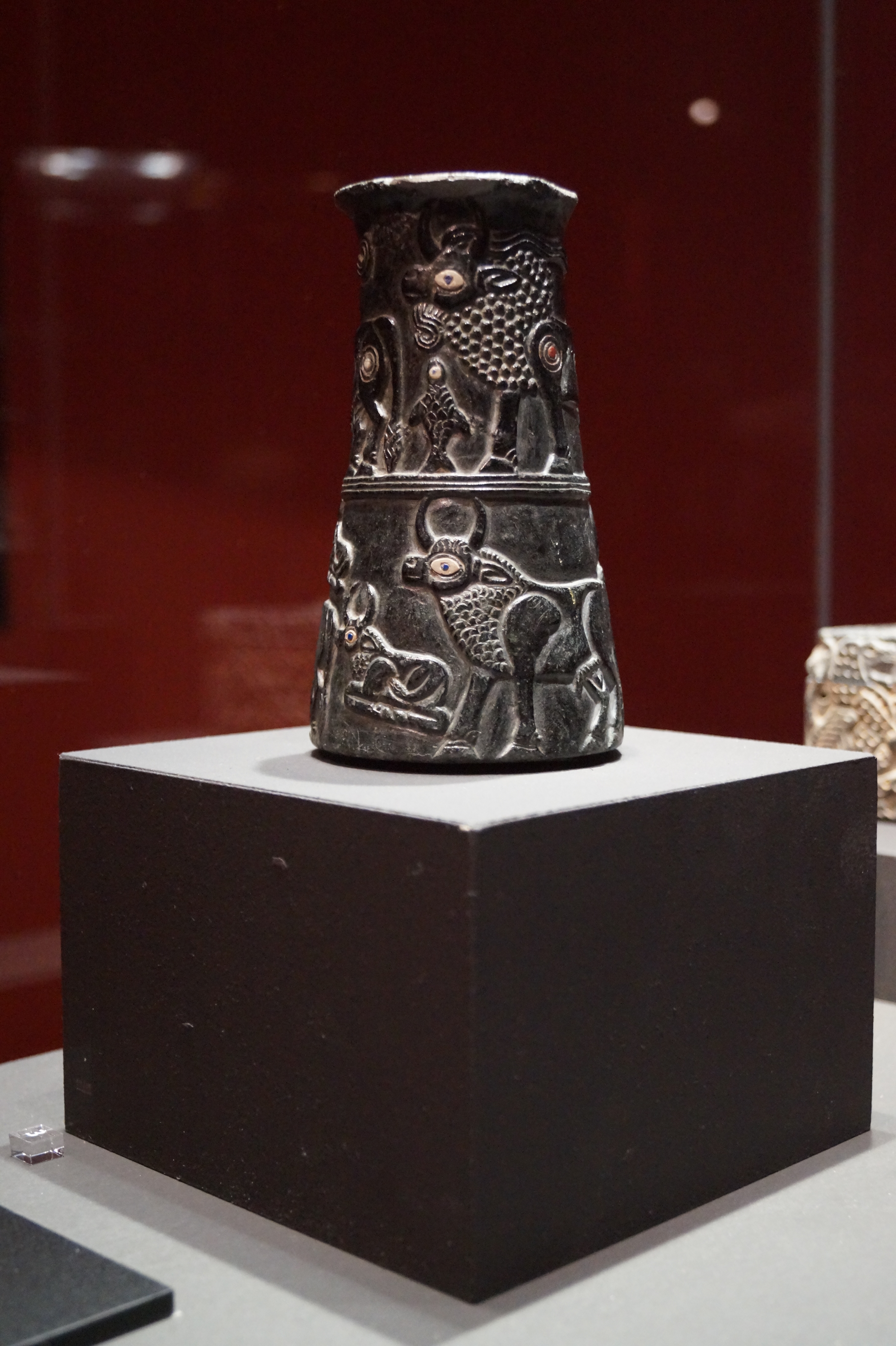 Die Ausstellung "Iran. Frühe Kulturen zwischen Wasser und Wüste" in der Bonner Kunst- und Ausstellungshalle der Bundesrepublik Deutschland zeigte vom 13. April bis 20. August 2017 Kunstgegenstände der iranischen Kulturen der Frühzeit, vom 7. bis ins 1. Jahrtausend v. Chr., und gab einen Einblick in auf eine in Europa wenig bekannte Bildwelt aus einem über Jahrzehnte verschlossenen Land.